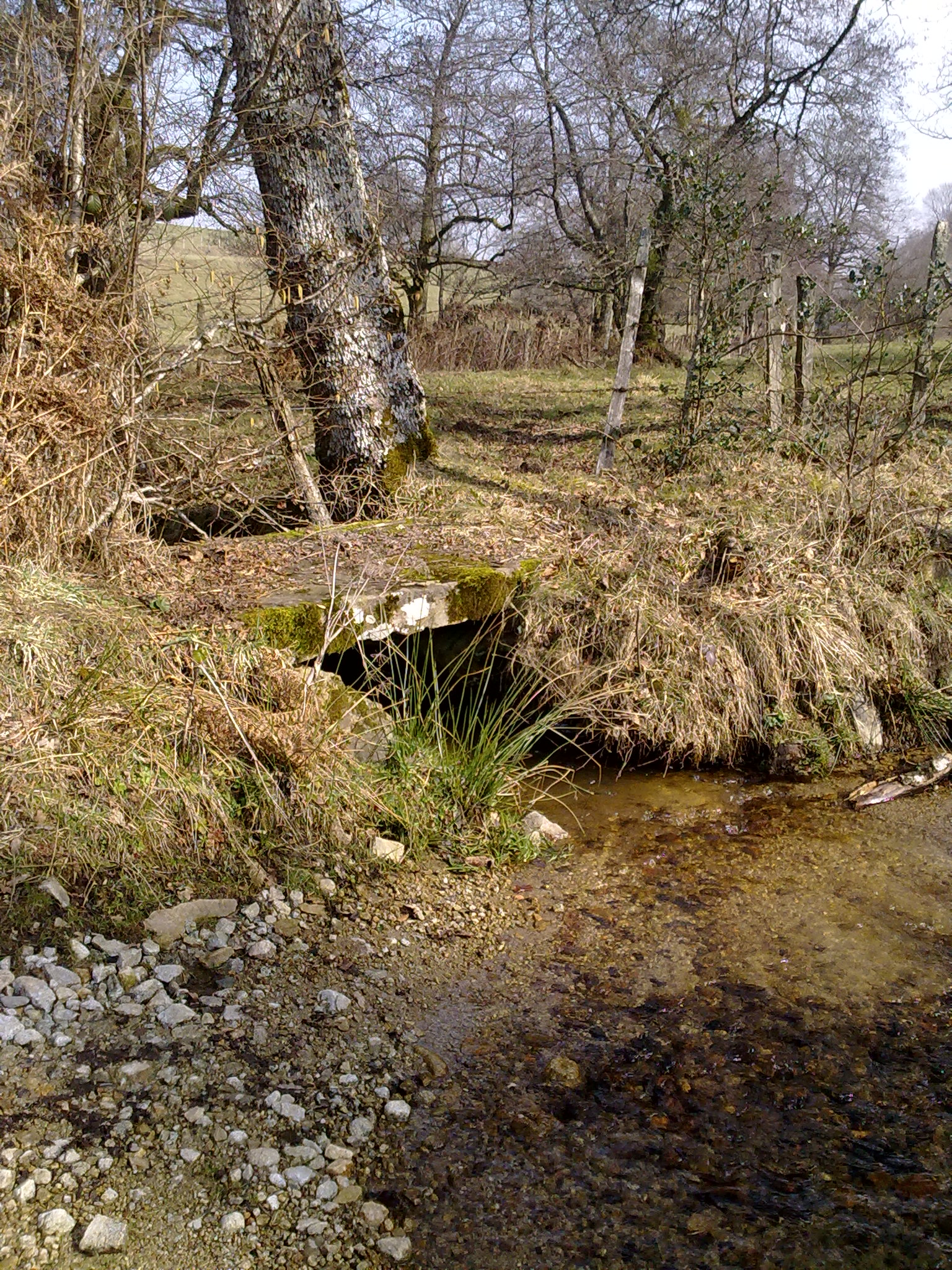 Pont en pierre au lieu dit "le Passage".